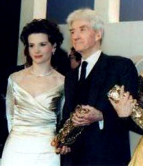 Juliette Binoche et Alain Resnais à la 23e cérémonie des César